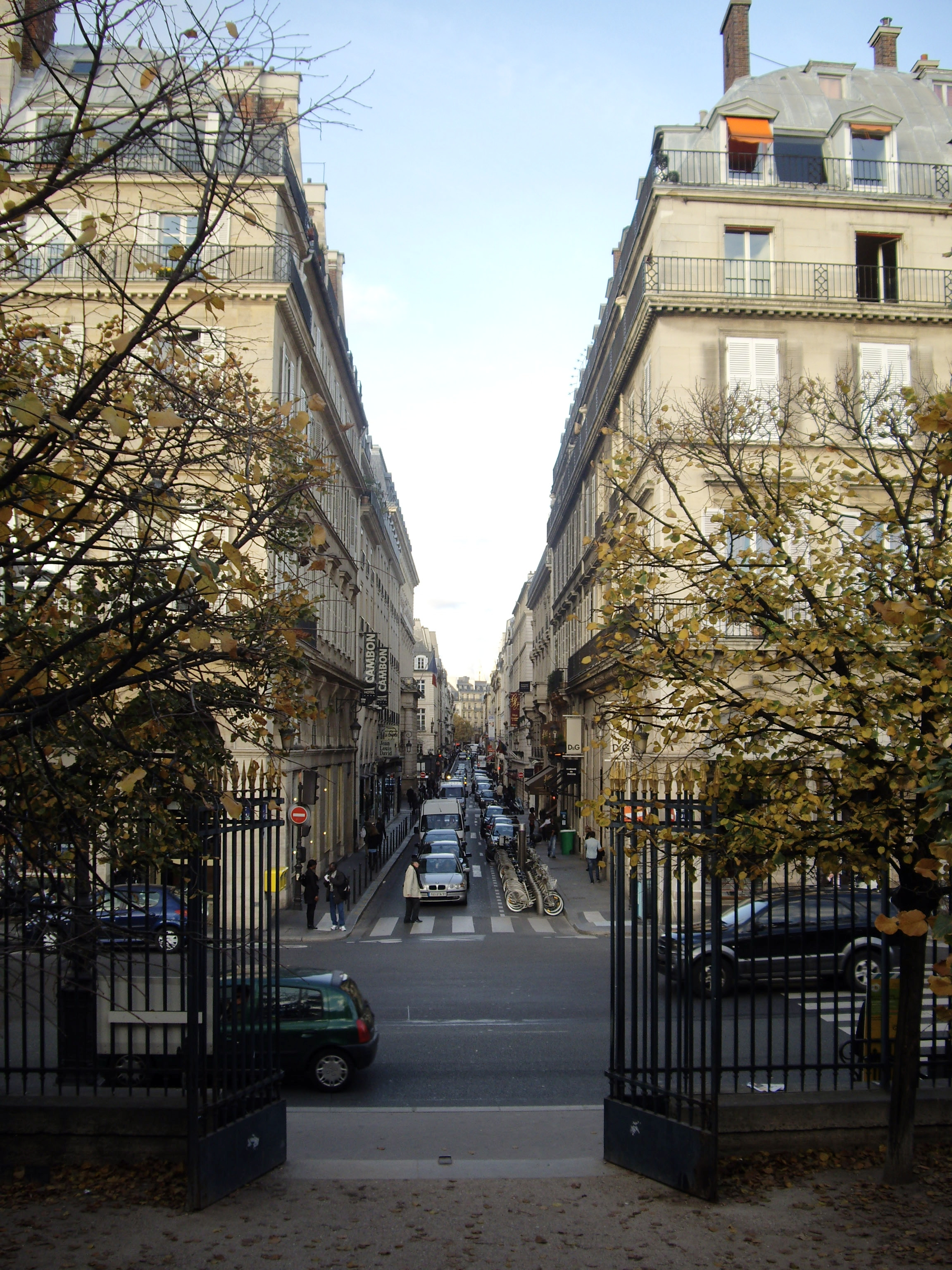 Rue Cambon, Paris 1er. Vue depuis le jardin des Tuileries. Au premier plan, la rue de Rivoli.